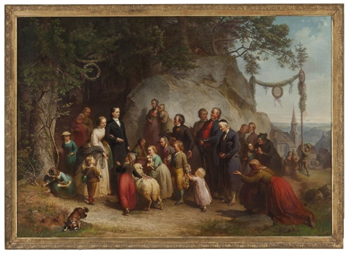 Wilhelm Emil Robert Heck (1831-1889) : Empfang eines neuen Pfarrers durch seine Gemeinde im Schwarzwald Landesmuseum Württemberg: Volkskundliche Sammlungen: VK 2008/39